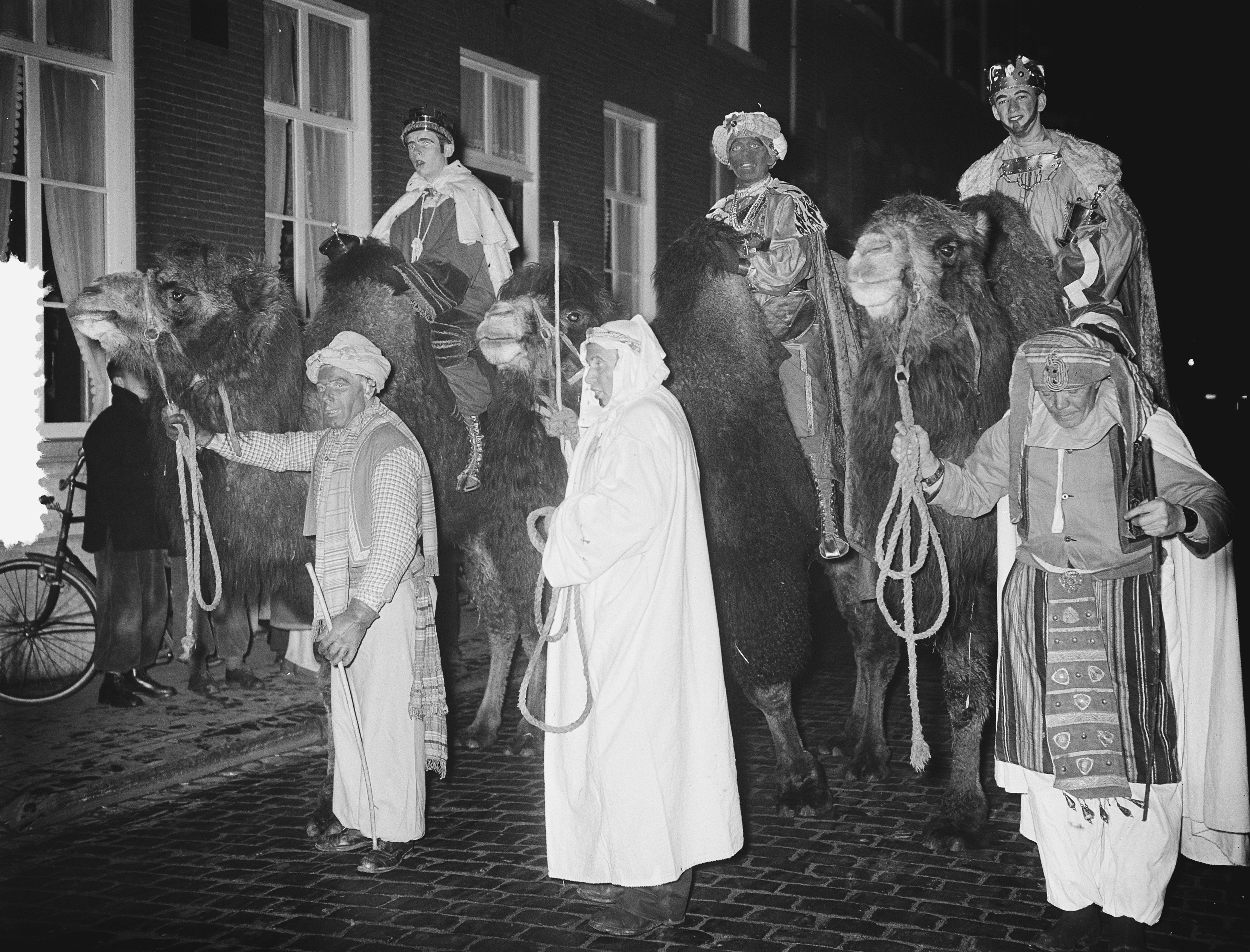 Collectie / Archief : Fotocollectie Anefo Reportage / Serie : [ onbekend ] Beschrijving : Driekoningenoptocht op kamelen door Eindhoven Datum : 5 januari 1955 Locatie : Eindhoven, Noord-Brabant Trefwoorden : driekoningen, kamelen, optochten Fotograaf : Bilsen, Joop van / Anefo Auteursrechthebbende : Nationaal Archief Materiaalsoort : Glasnegatief Nummer archiefinventaris : bekijk toegang 2.24.01.09 Bestanddeelnummer : 906-9241